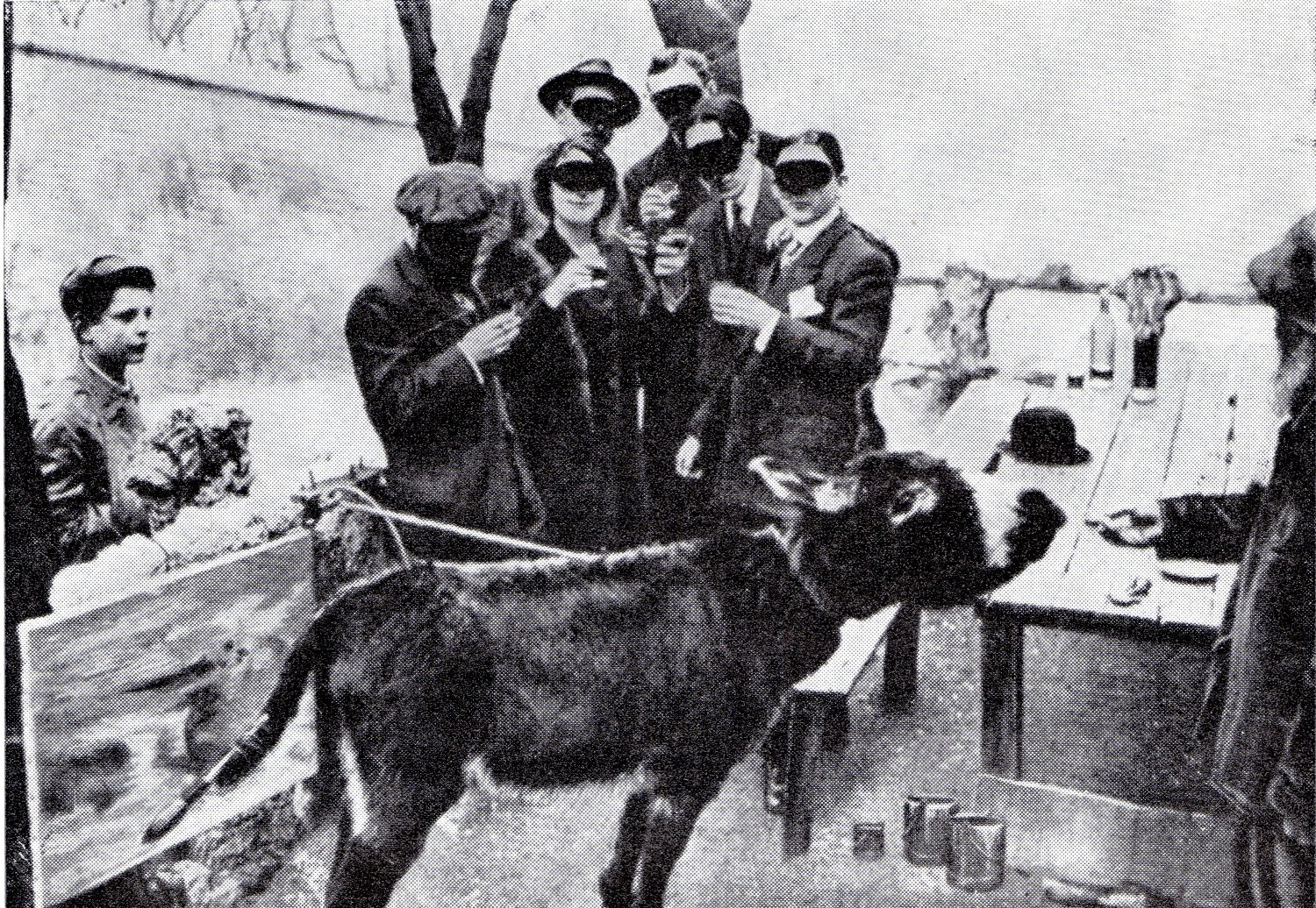 Zdjęcie przedstawiające osła malującego obraz "Zachód słońca nad Adriatykiem"